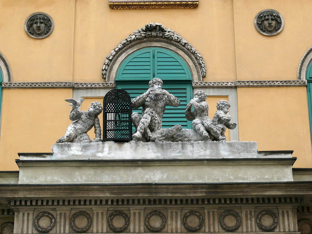 Papagenotor, detail